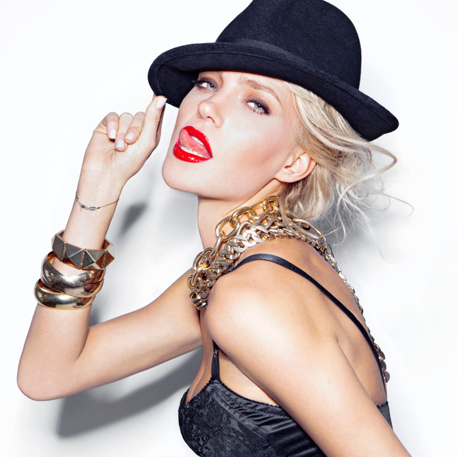 Фото из фотосессии Натальи Арефьевой